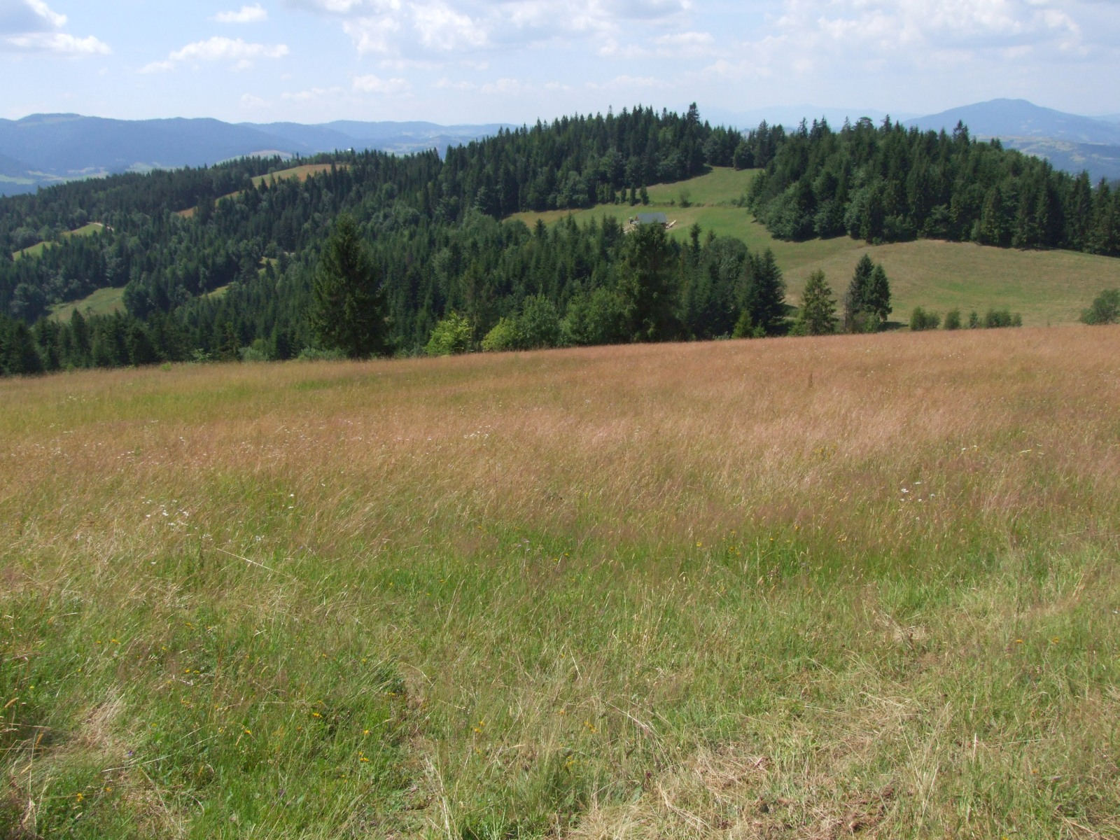 Polana Stasiówka na Cyrkowej Górze